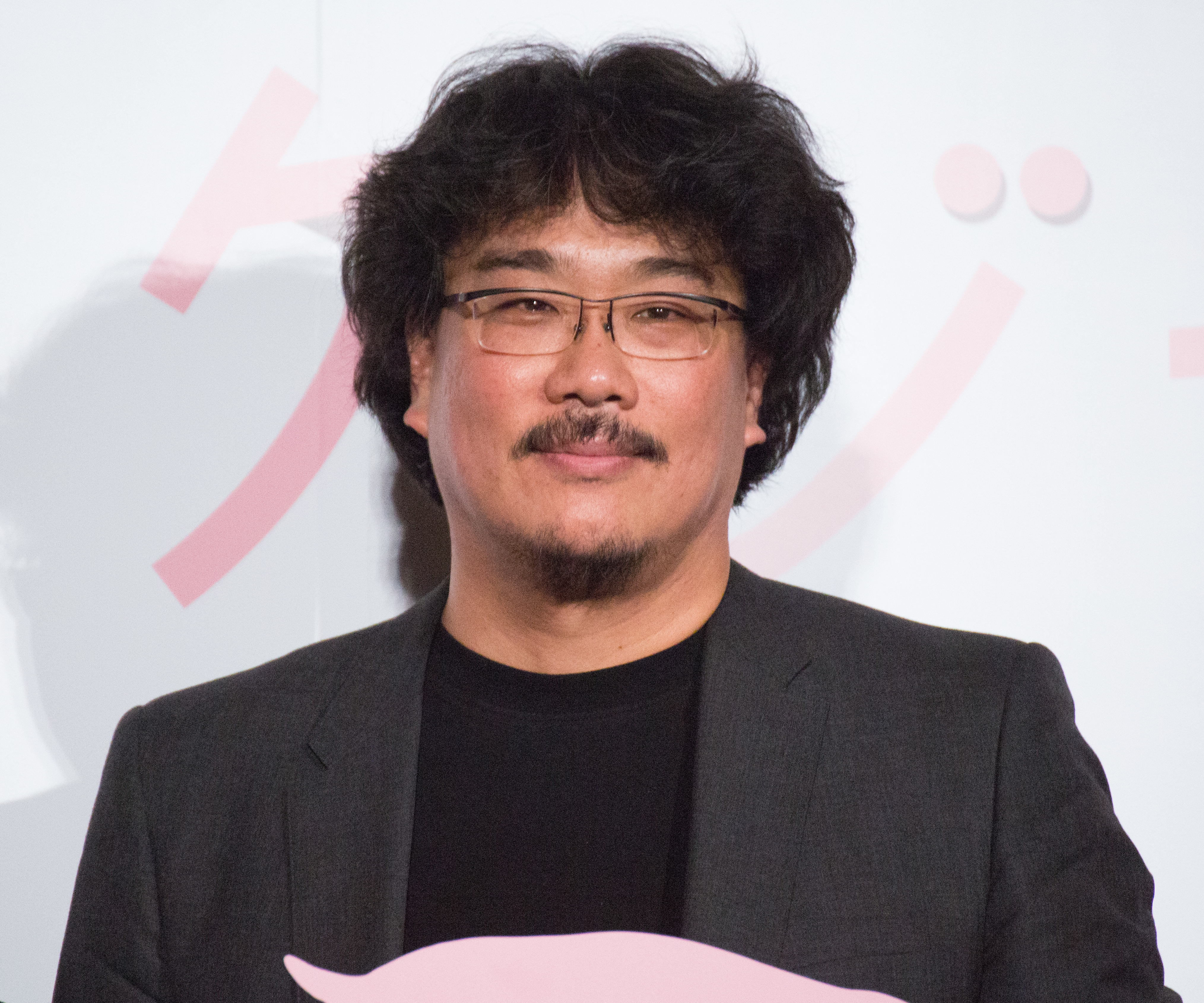 オクジャ/okja ジャパン・プレミア ポン・ジュノ